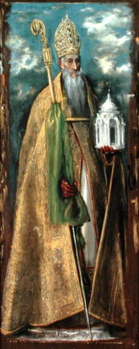 Święty Augustin - (1597-1603), 140 x 56 cm, Museo Santa Cruze, Toledo